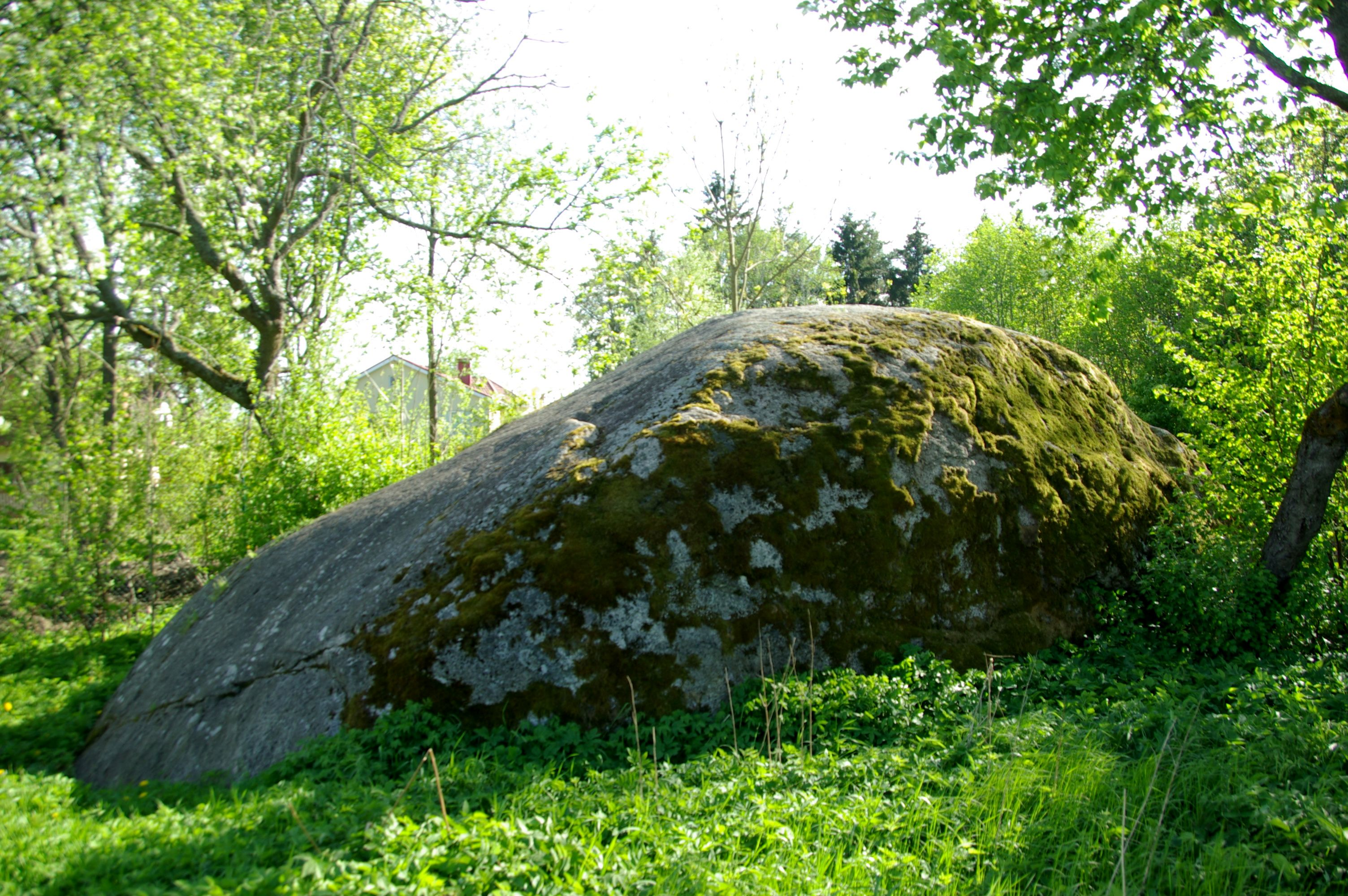 Asub Merivälja pansionaadi taga,Ranniku tee 48